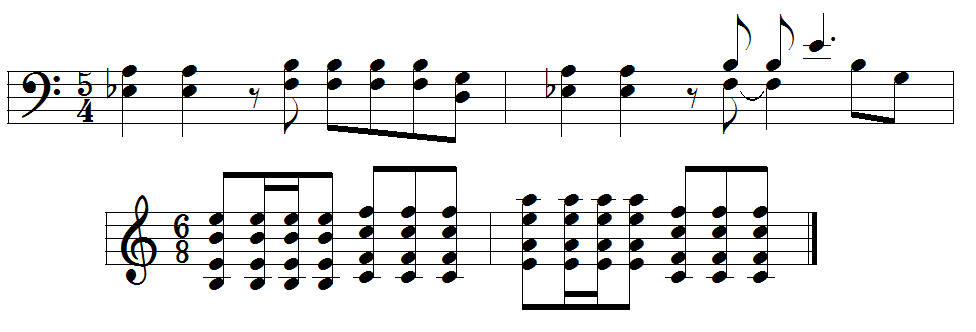 Hauptriffs von „Pre-Ignition“ von Voivod